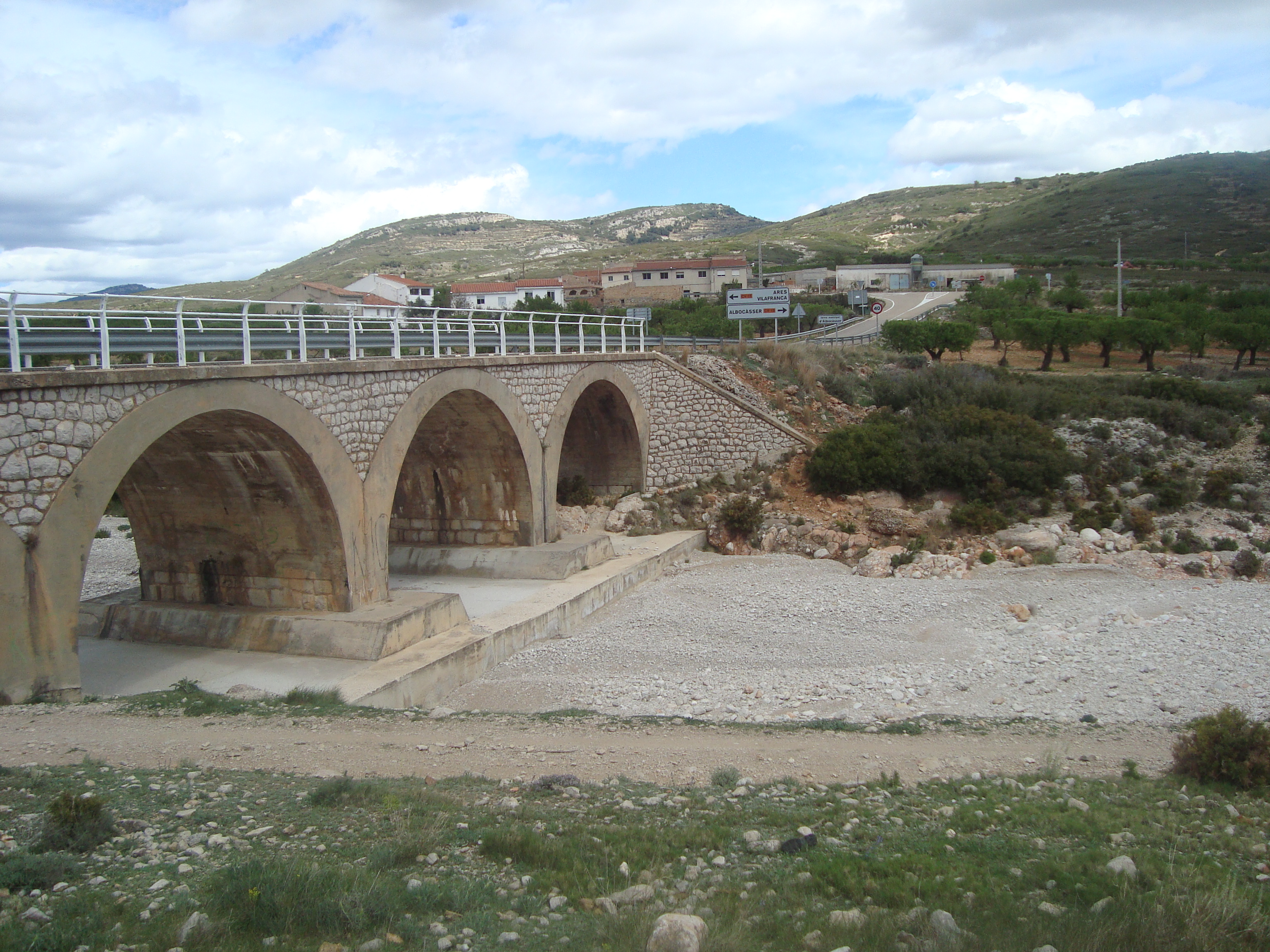 Rambla Carbonera a su paso por el puente de Vilar de Canes